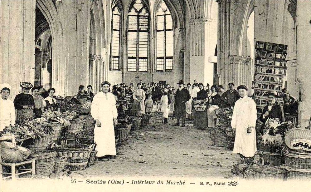 Le marché couvert dans l'ancienne église Saint-Pierre ; vue en direction du chœur.